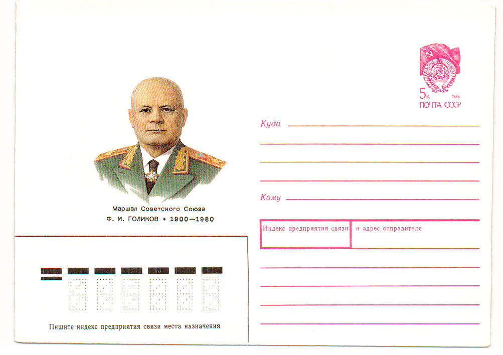 Голиков Филипп Иванович почтовый конверт